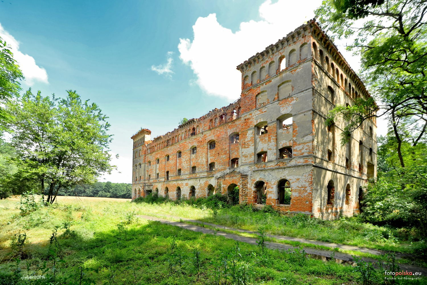 Spichlerz